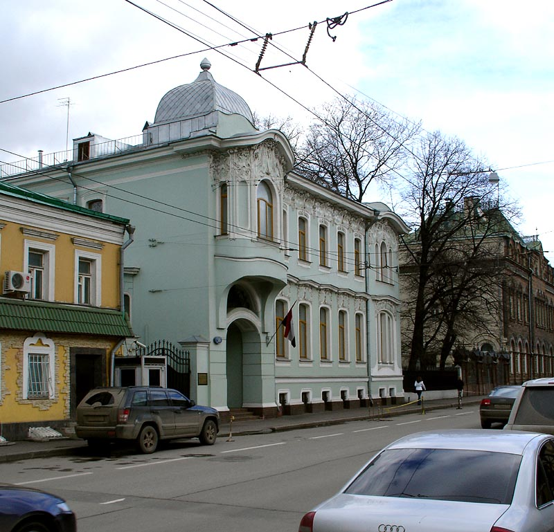 56 Bolshaya Nikitskaya, Moscow, Russia.